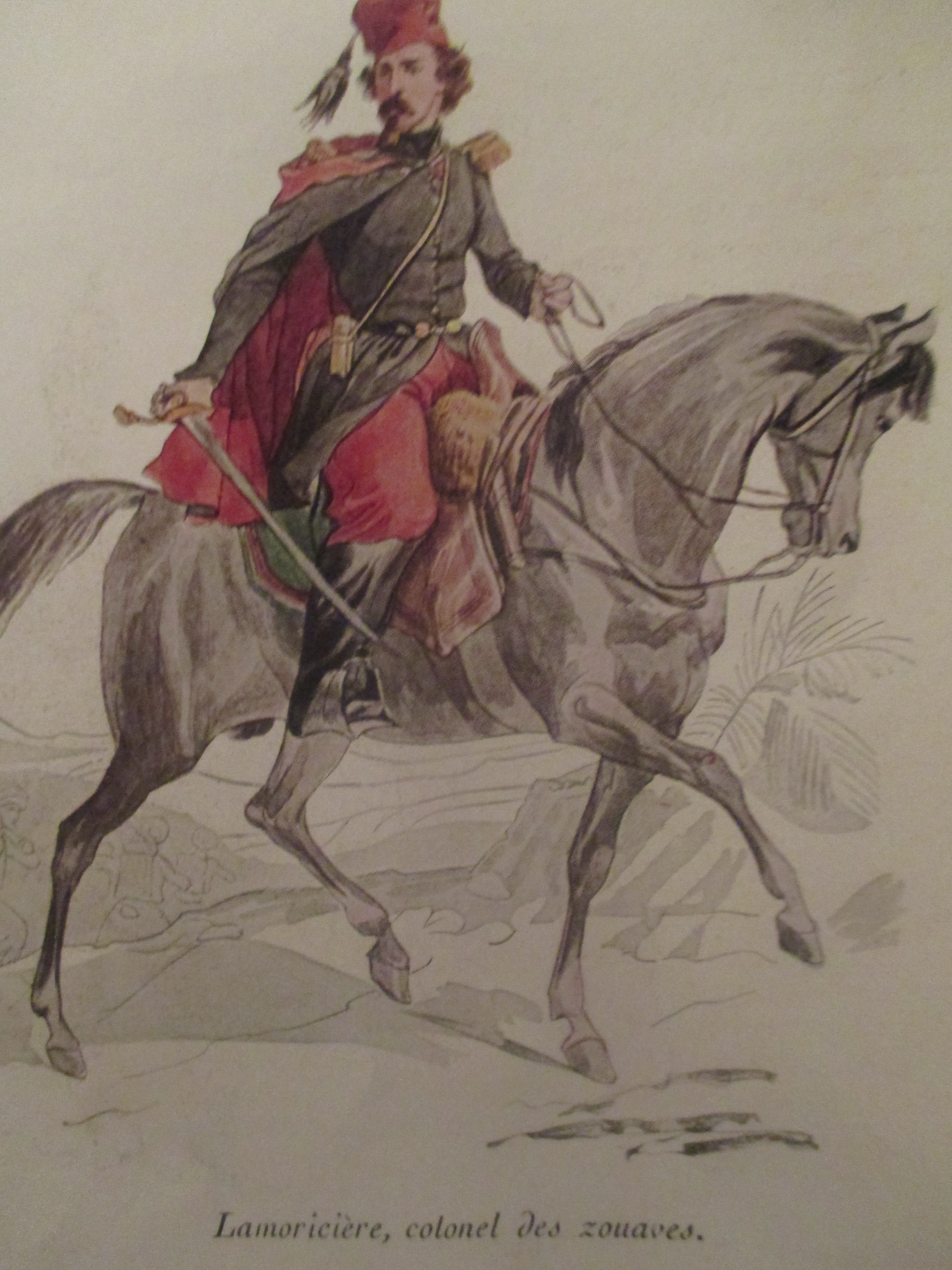 Aquarelle de Philippoteaux représentant Lamoricière (coll. château de Chantilly), reproduite dans L'Illustration du 24 mai 1930.